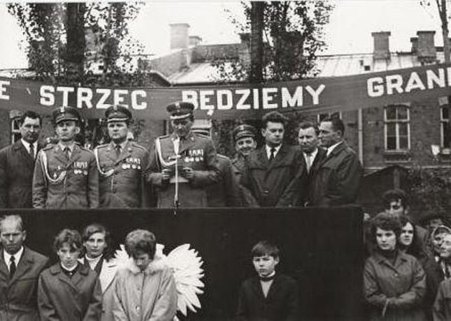 Przasnysz. Przysięga wojskowa w JW 3832. Drugi z prawej dowódca mjr Arkadiusz Wielechowski